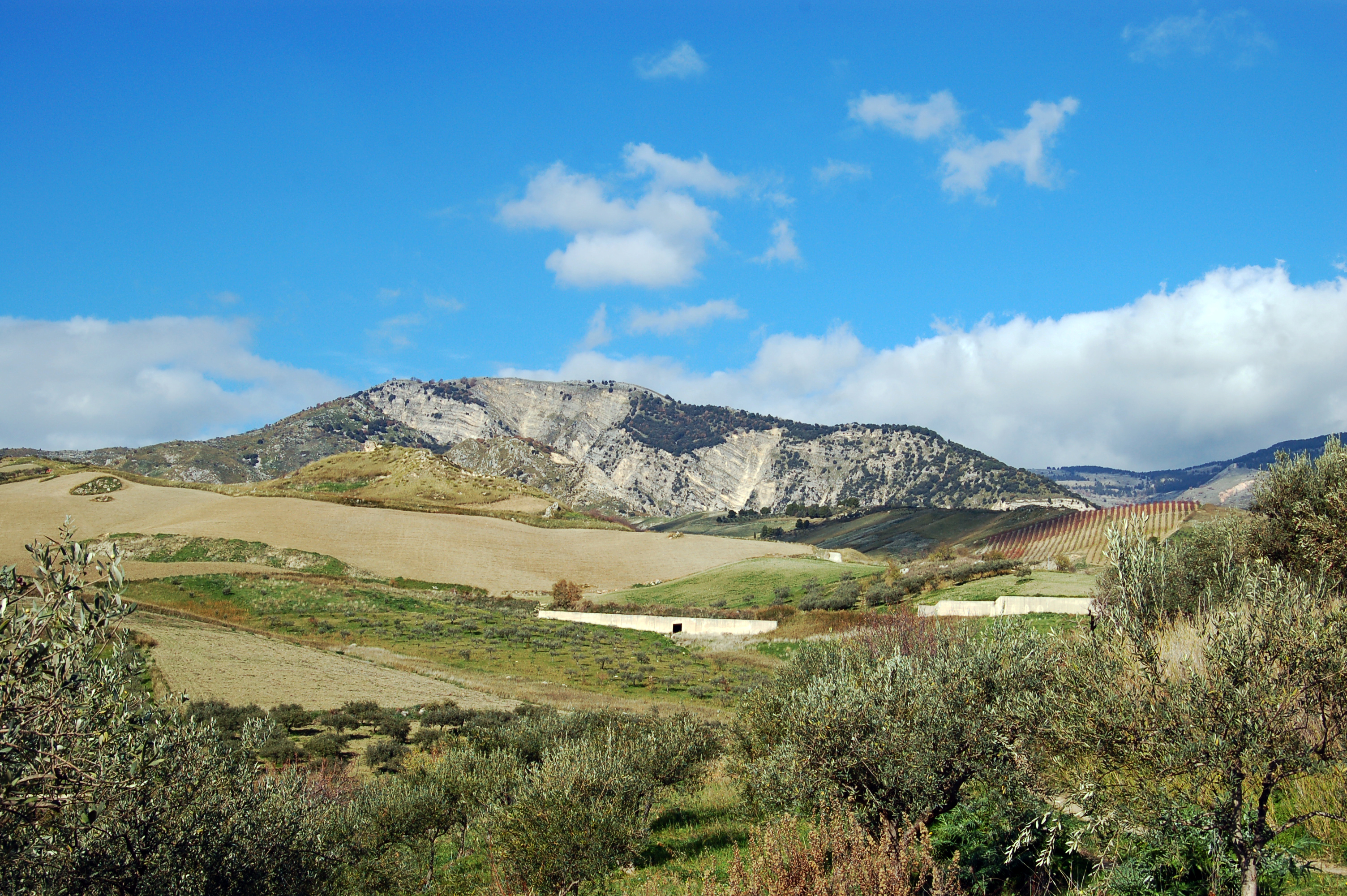 Vista di Pizzo Mondello da Contrada Salito.